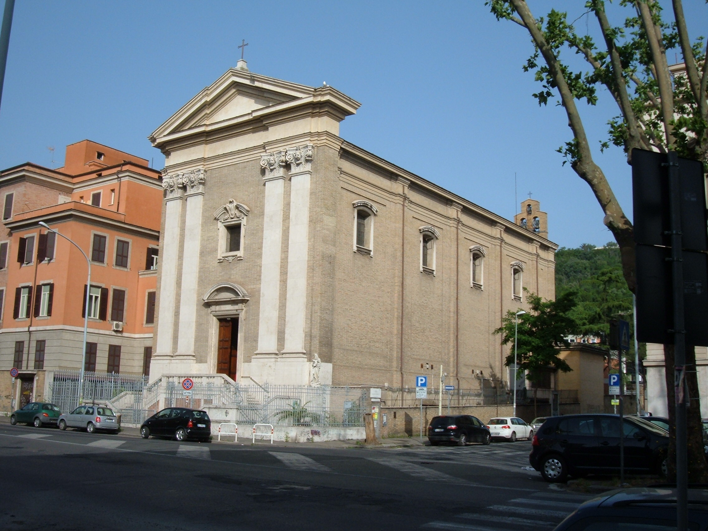 Chiesa di Santa Giovanna Antida Thouret, a Roma, nel quartiere Della Vittoria.